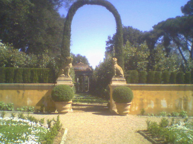 View in Villa La Pietra Garden in Florence, italy